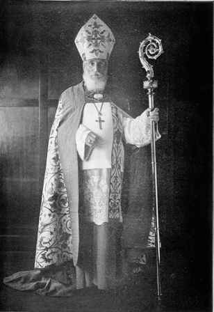 Charles Webster Leadbeater (1847-1934), als Bischof der Liberalkatholischen Kirche, Sydney, Australien 1925